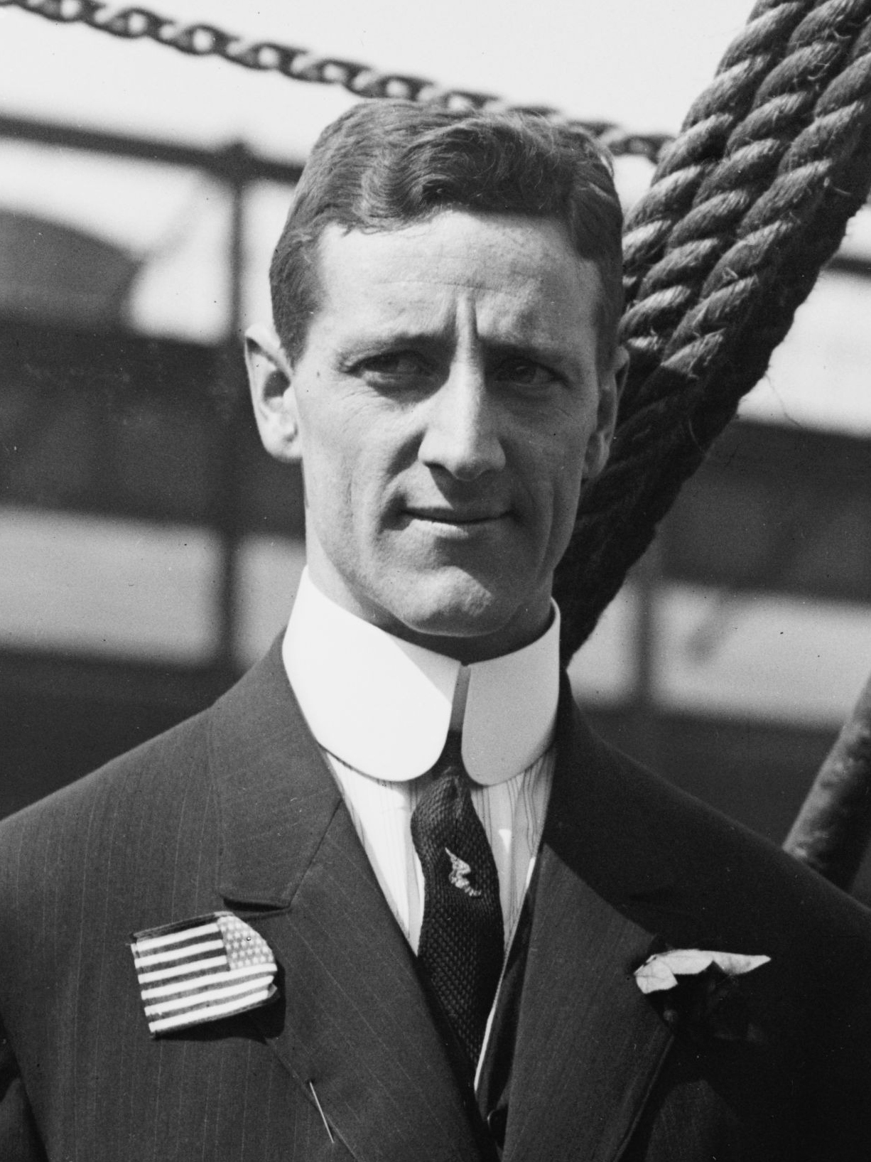 Platt Adams